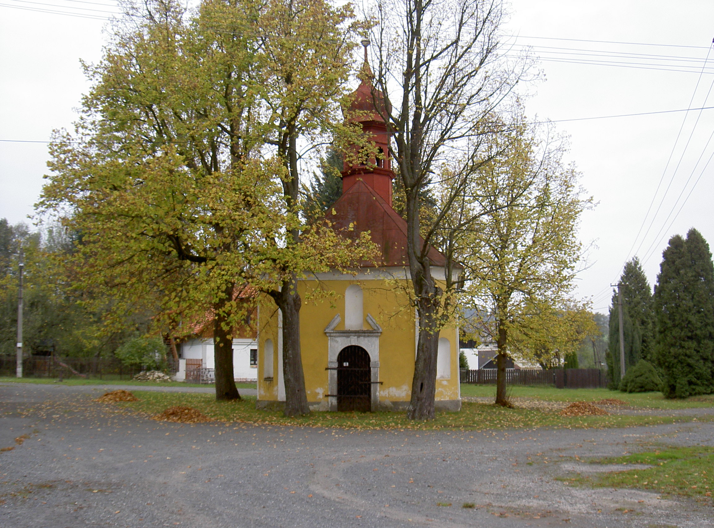 Kapelle der Allerheiligsten Dreifaltigkeit in Mnichov